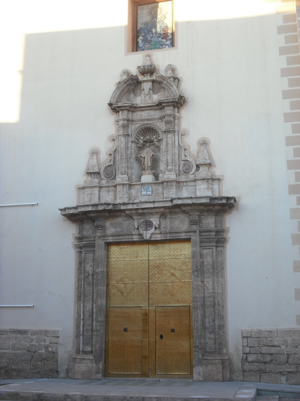 Puerta de la Iglesia de Museros.